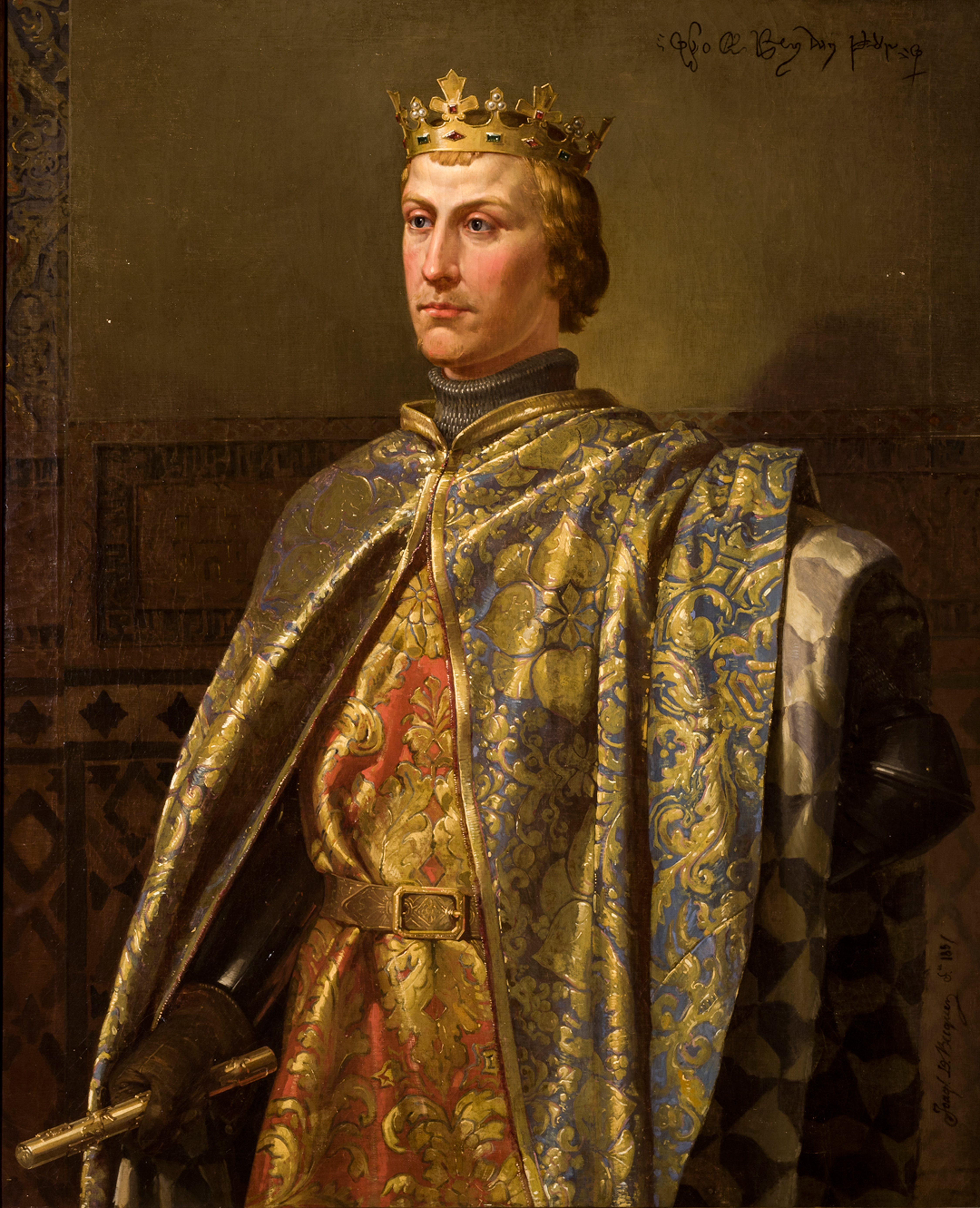 Retrato imaginario del rey Pedro I de Castilla (1334-1369), que fue hijo de Alfonso XI de Castilla y de la reina María de Portugal. Este monarca, que fue apodado el Cruel por sus enemigos y el Justiciero por sus partidarios, gobernó Castilla desde 1350 hasta su asesinato en 1369 tras su derrota en la batalla de Montiel, y estuvo siempre vinculado a la ciudad de Sevilla y a su Real Alcázar. Y el pintor Joaquín Domínguez Bécquer se inspiró para realizar este retrato en las crónicas coetáneas al monarca que lo describen como blanco de piel, de rostro majestuoso y con el pelo rubio y los ojos azules.